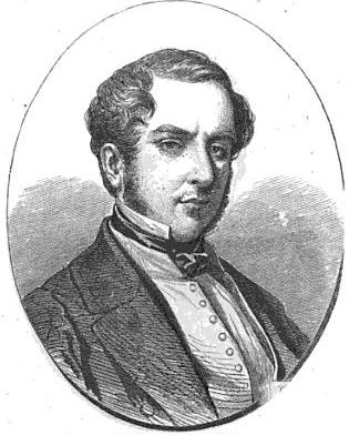 Baron de Bourqueney.